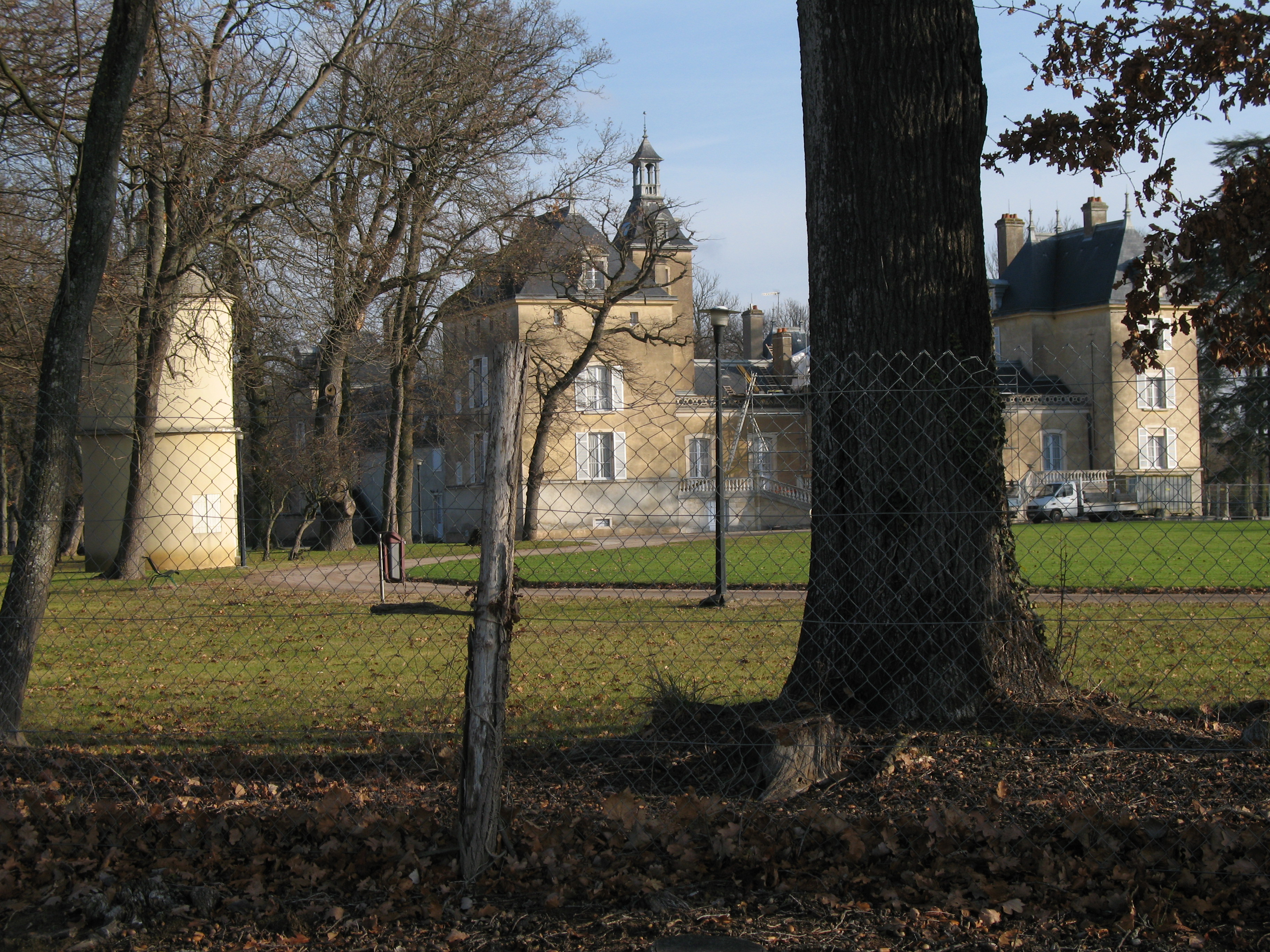 château de la Loyère (Saône-et-Loire)